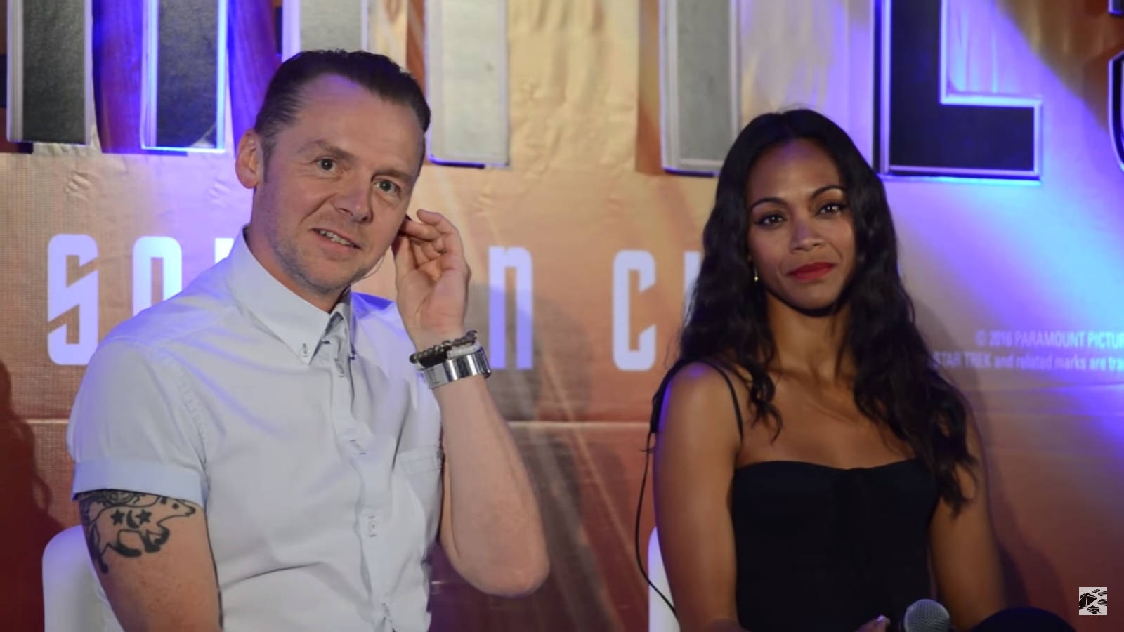 Simon Pegg y Zoe Saldana en una conferencia de prensa sobre Star Trek en México